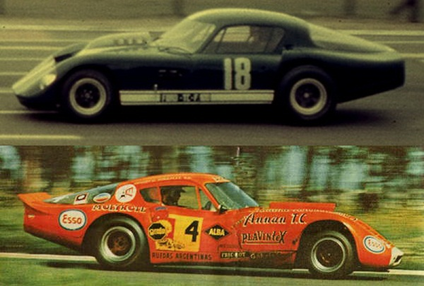 Foto comparativa en similitudes de los modelos Baufer Ford F-100 y Trueno Naranja Chevrolet de 1967 y 1968 respectivamente.